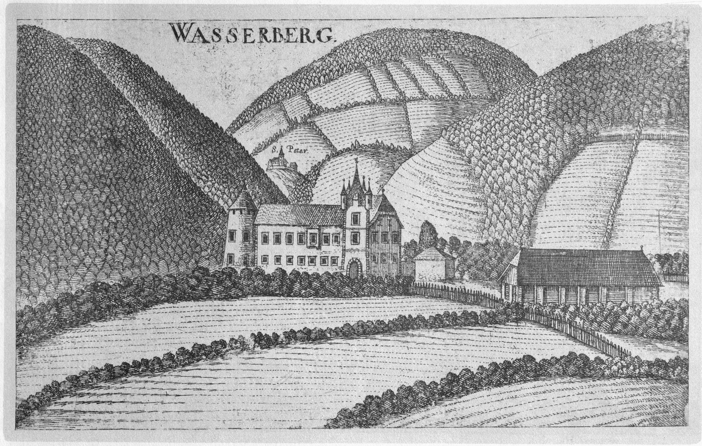 G. M. Vischers Käyserlichen Geographi, Topographia Ducatus Stiriae, Das ist: Eigentliche Delineation / und Abbildung aller Städte / Schlösser / Marcktfleck / Lustgärten / Probsteyen / Stiffter / Clöster und Kirchen / so es sich im Herzogthumb Steyrmarck befinden; Und anjetzo Umb einen billichen Preyß zu finden seynd Bey Johann Bitsch Universitäts Buchhandlern / Auff dem Juden=Platz bey der guldenen Saulen. Graz 1681 Die Nummerierung der Dateien folgt der alphabetischen Reihung der Ortsnamen und entspricht nicht dem Vischer-Register